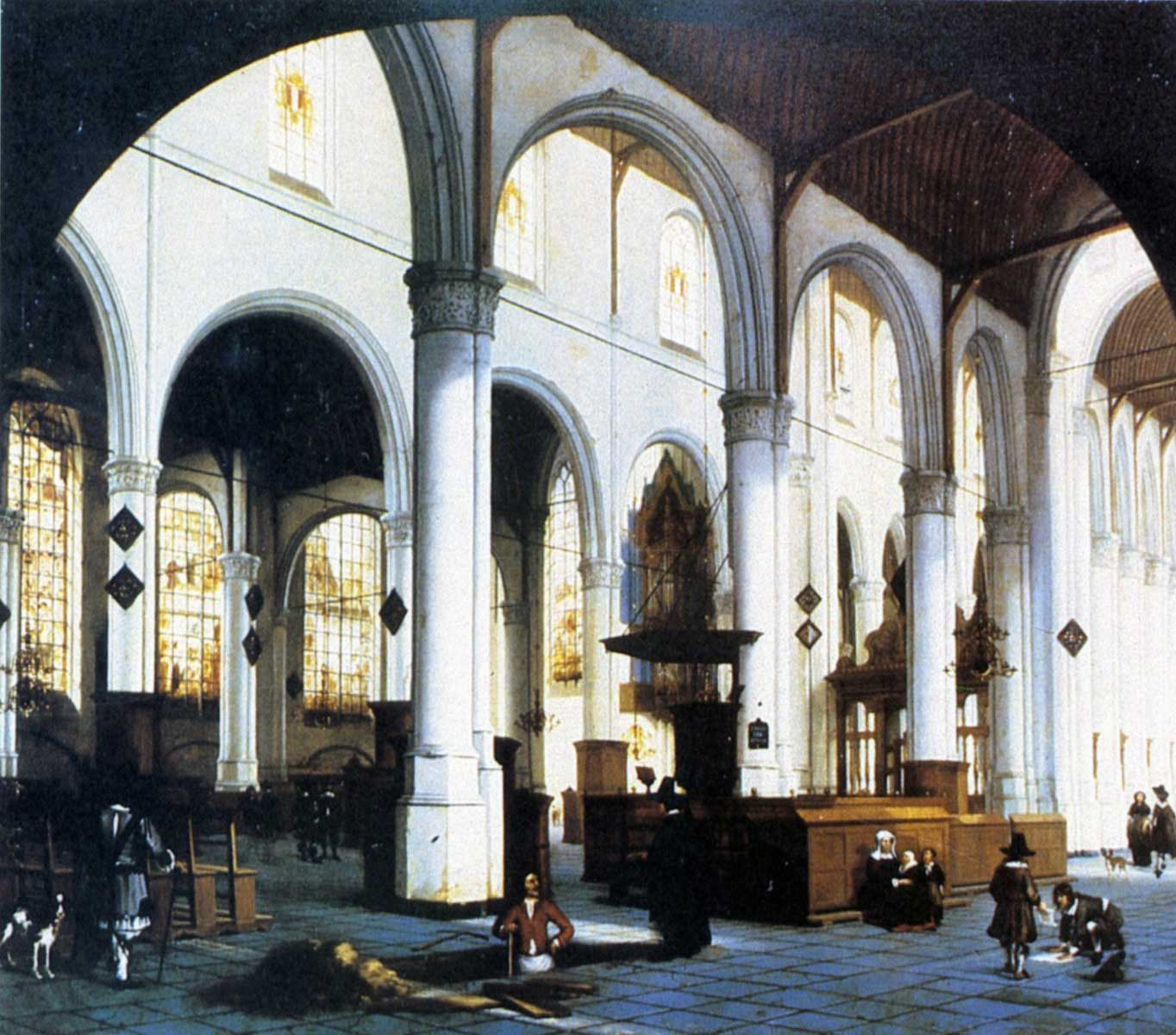 Interieur Sint Janskerk te Goudalabel QS:Lnl,"Interieur Sint Janskerk te Gouda"